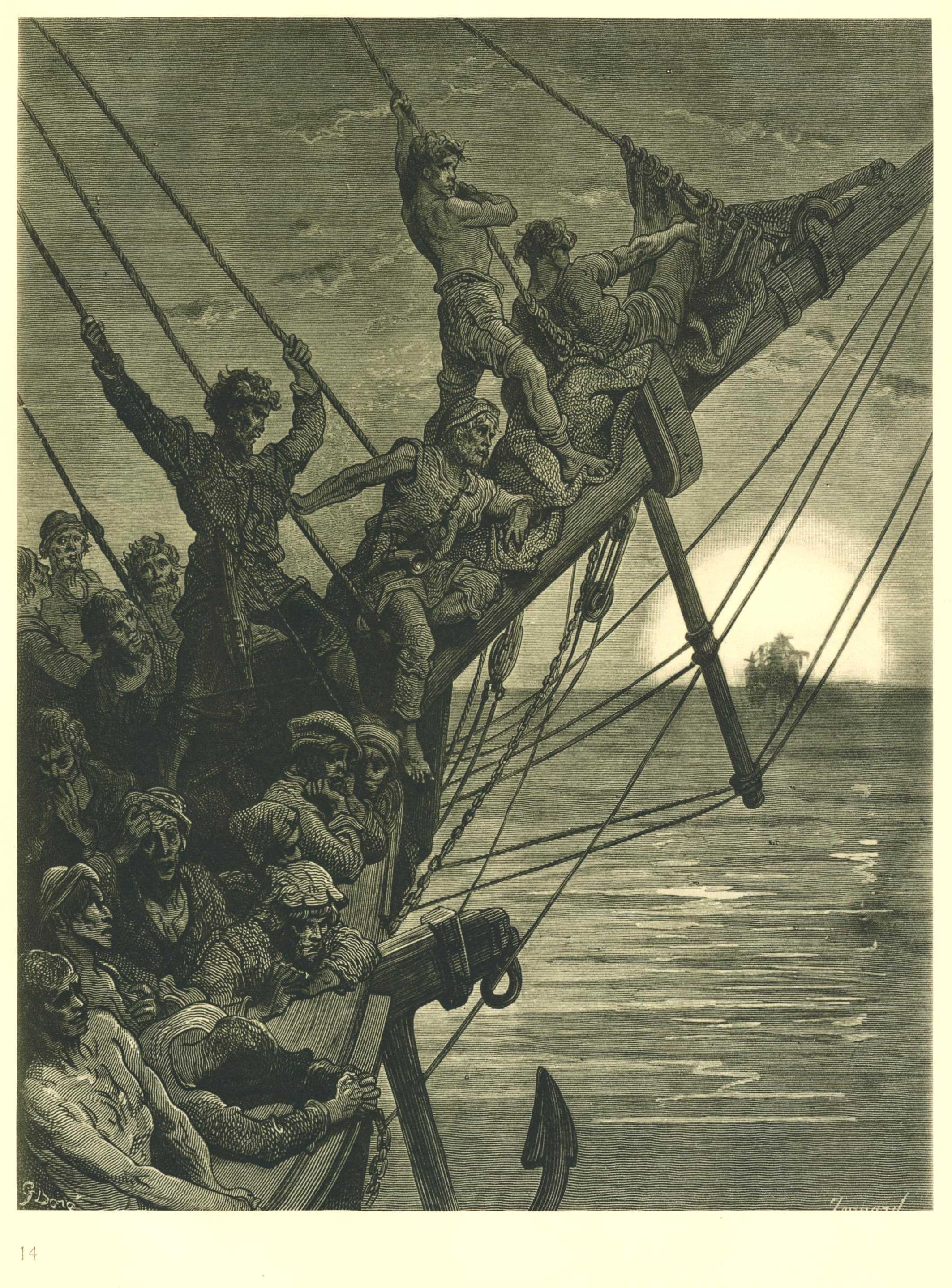 Ein Segel! schaut! (Beschreibung lt. Quelle)